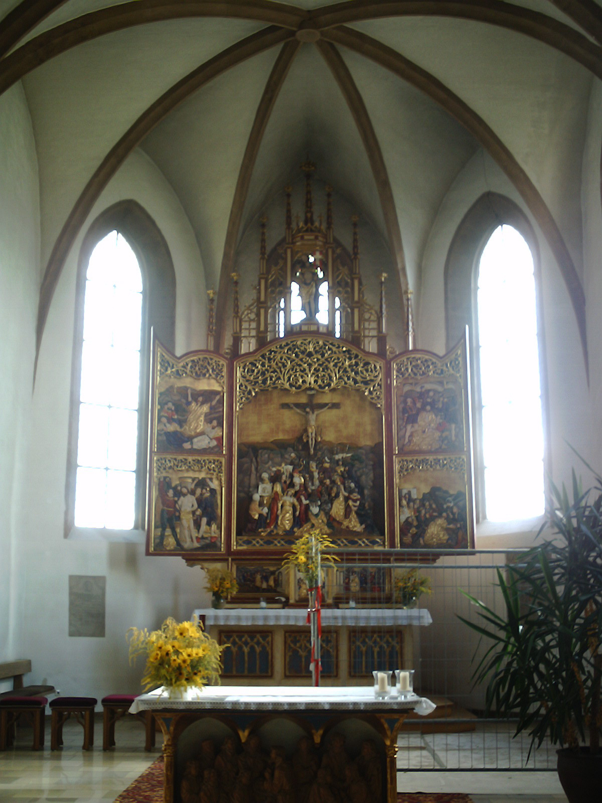 Altar der Kirche St.Laurentius in Eschenbach in der Oberpfalz